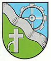 Wappen von Matzenbach